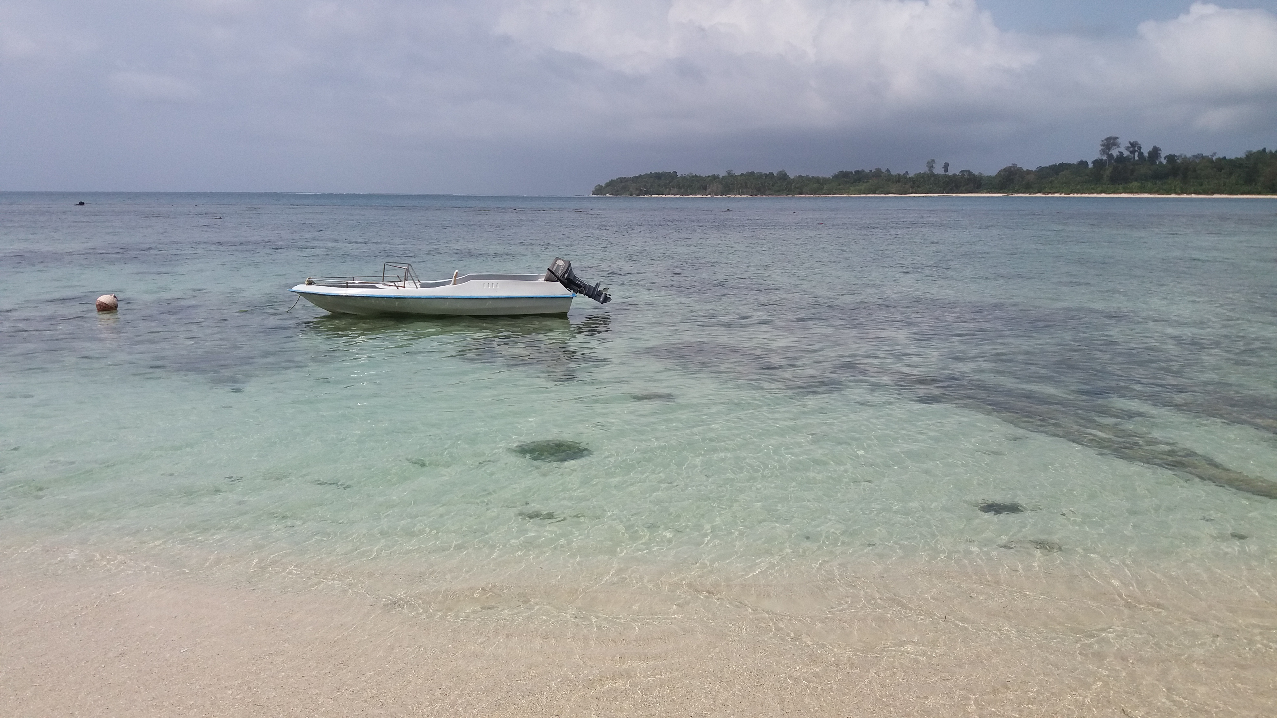 Pantai Jati, Tuapejat